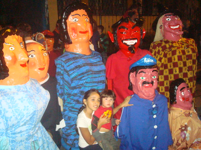 Celebración del Día Nacional de la Mascarada Tradicional Costarricense en Escazú. 31 de octubre de 2013.